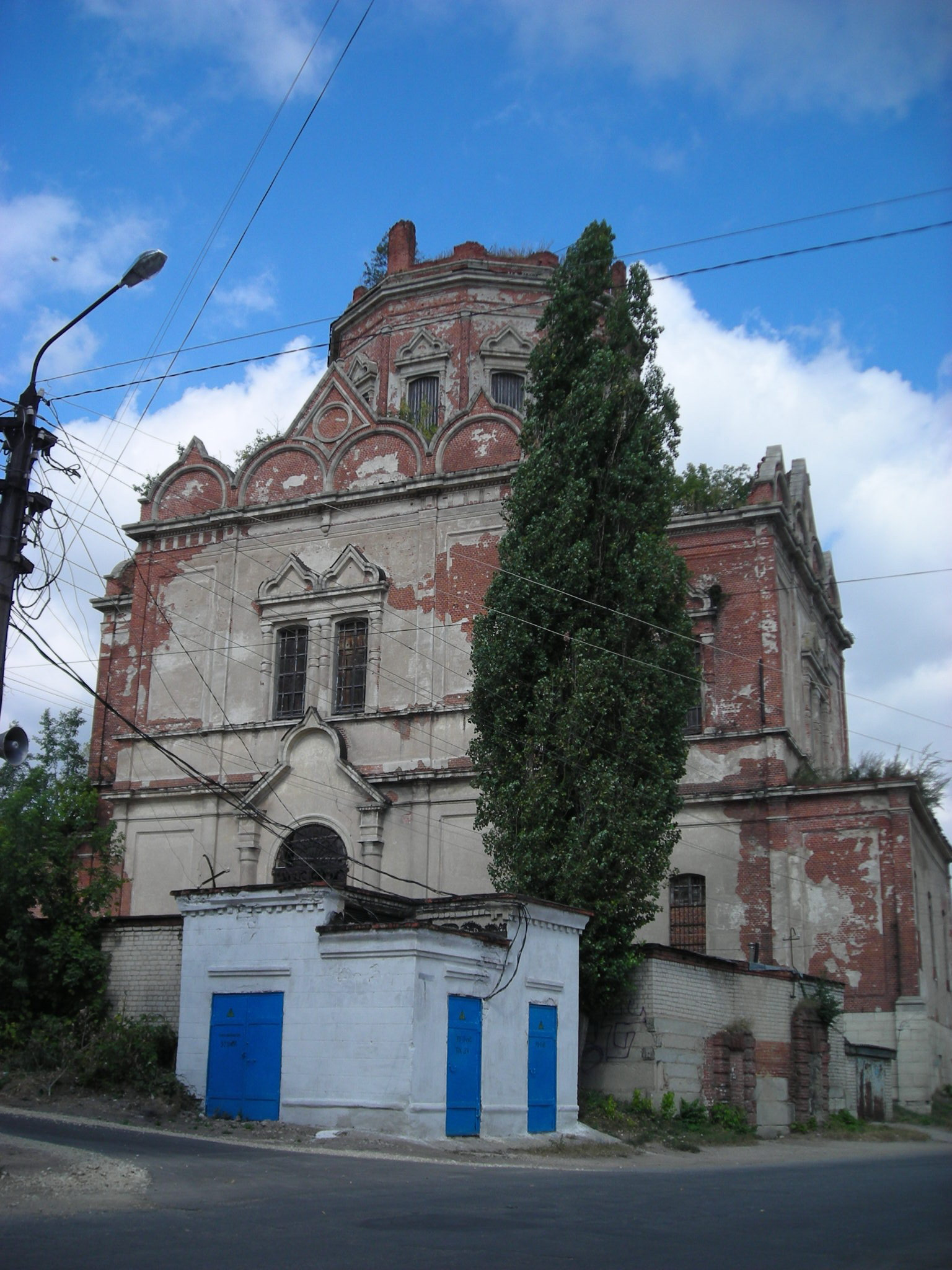 Покровская церковь в районе Чёрная Слобода